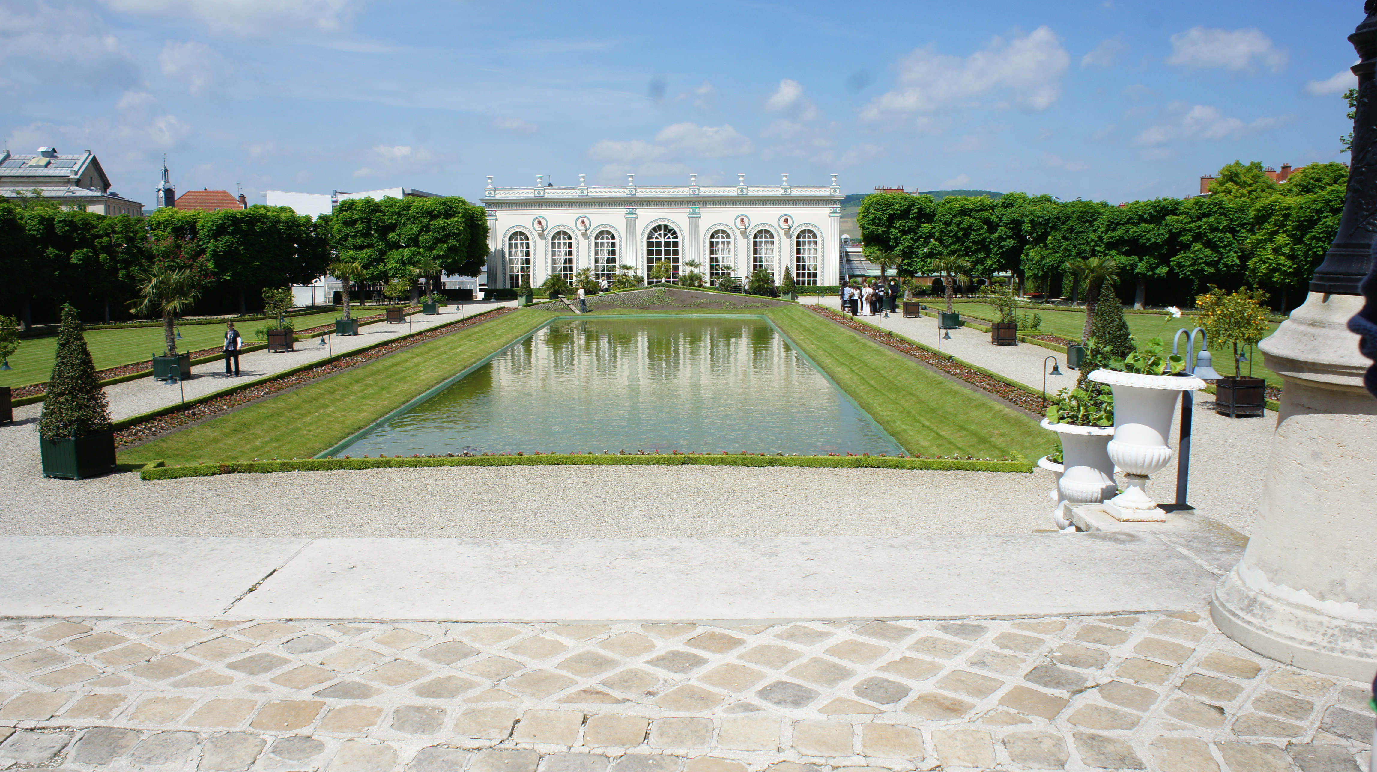 Vue du parc et château Moet & Chandon .